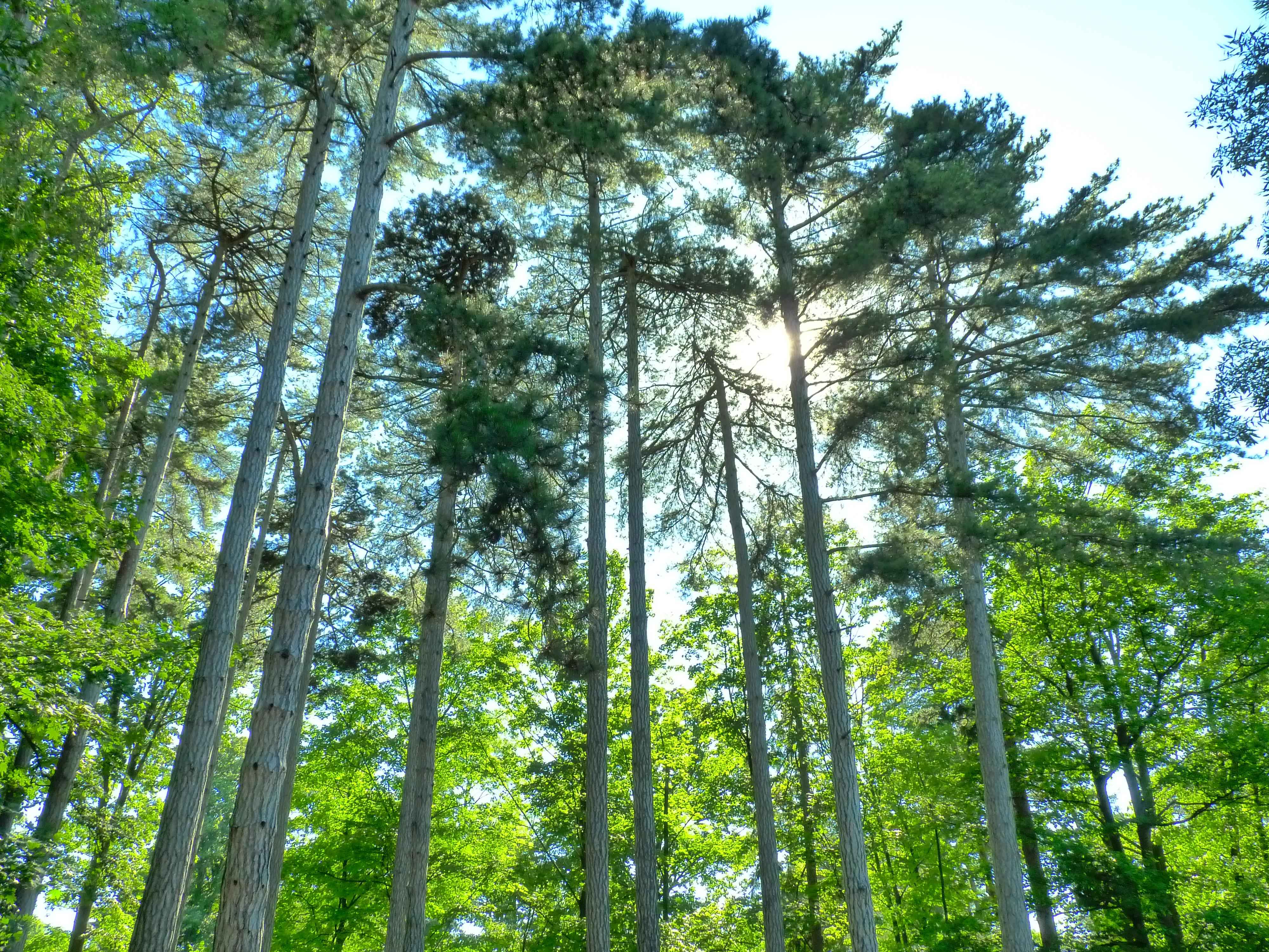 Lyon - Arbres du Parc de la Tête d'Or